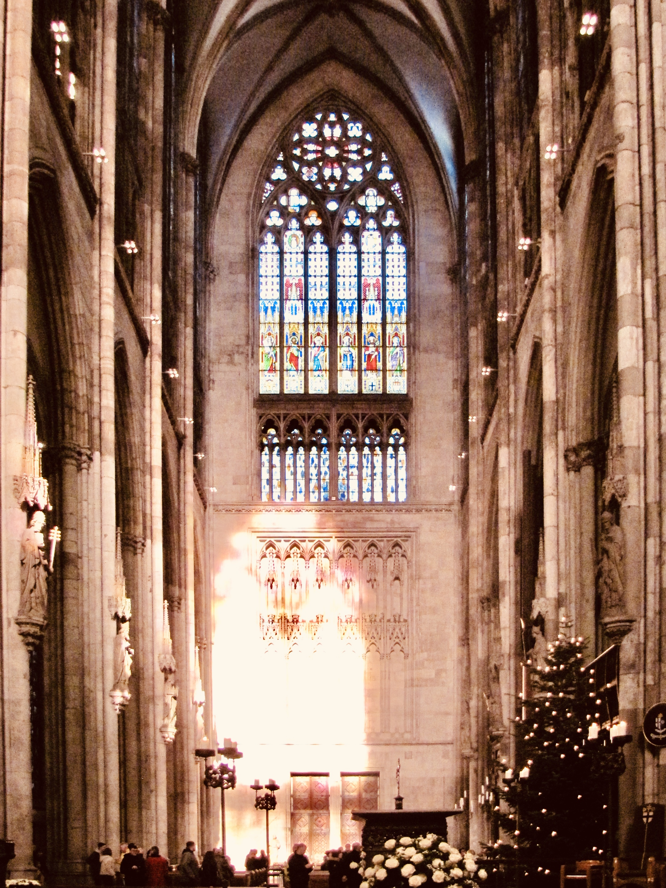 Kölner Dom: Das Richter-Fenster in der Südquerhausfassade wirft einen fein abgestimmtes Lichtklang in das Querschiff. Zur Mittagszeit im Winter erscheint das Farbmosaik des Richterfensters an der Nordquerhauswand unter dem Baudri-Fenster.